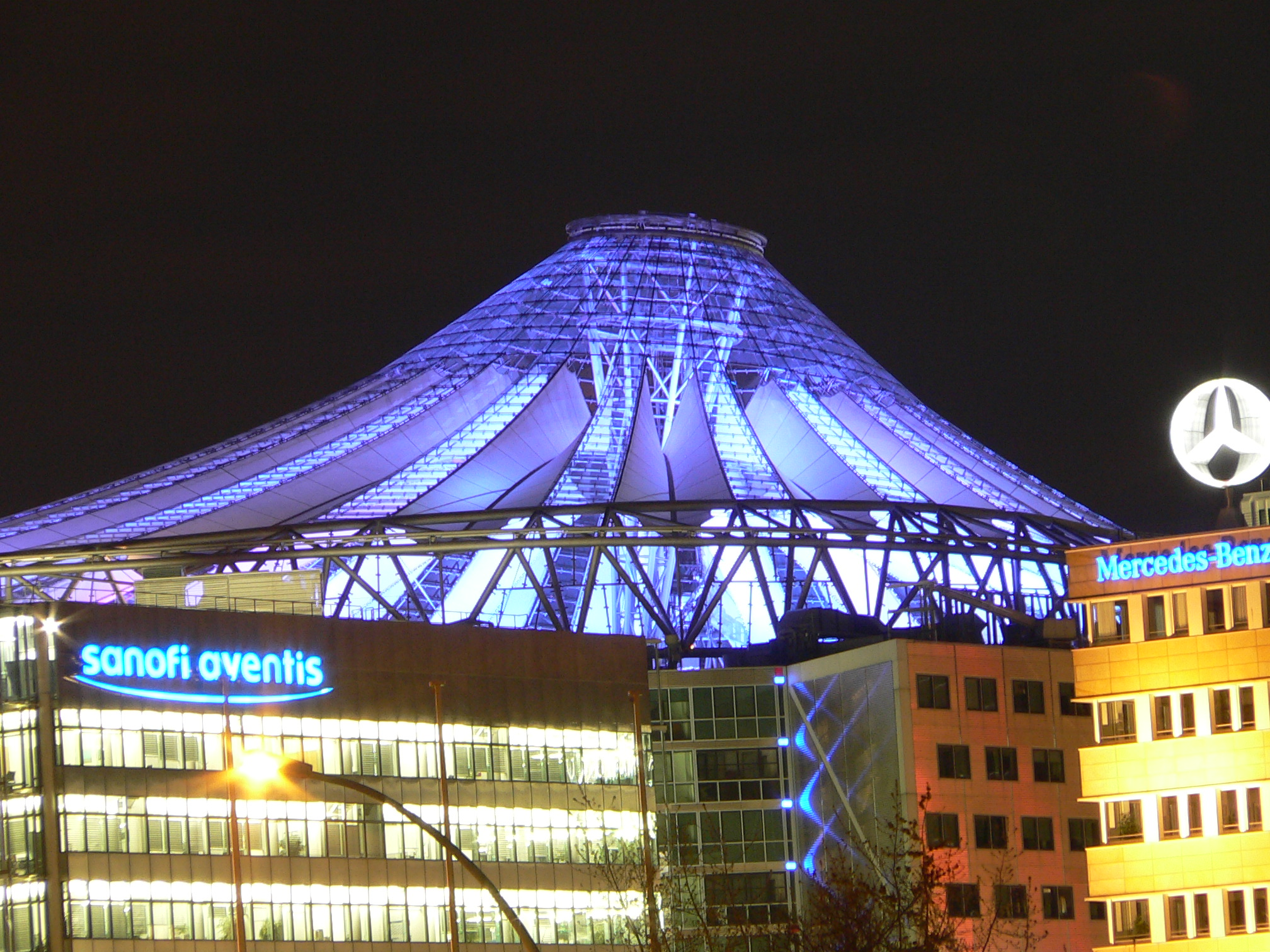 Sony Center Berlin, nächtliches Lichtspiel, selbst fotografiert